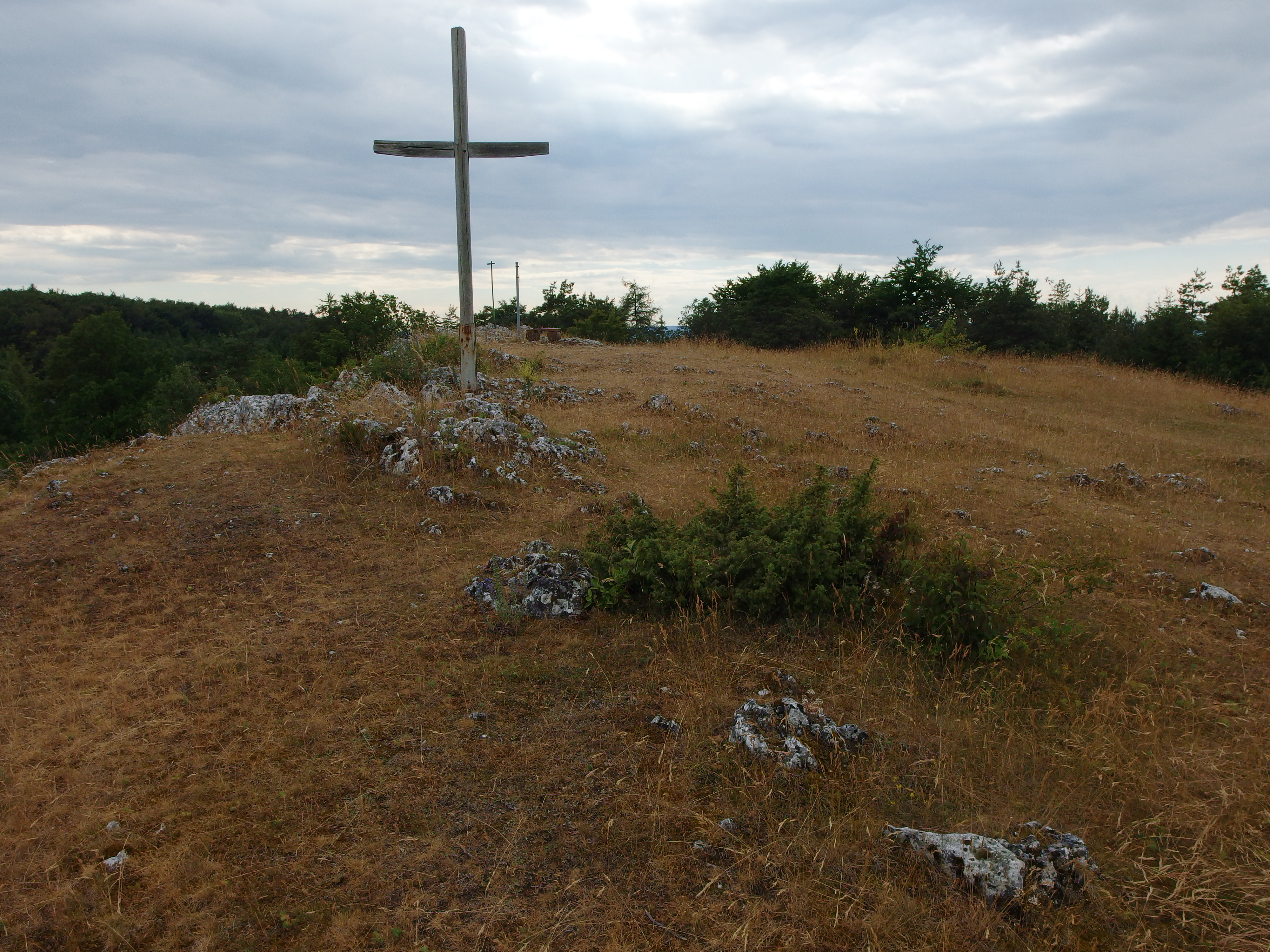 Landschaftsschutzgebiet „Schutz von Landschaftsteilen im Bereich der Stadt Harburg und der Gemarkung Großsorheim“ (LSG-00253.01): Harburg-Großsorheim, Bock Gipfelkreuz; typische Trockenrasenfläche mit einzelnen kleinwüchsigen Wacholdern